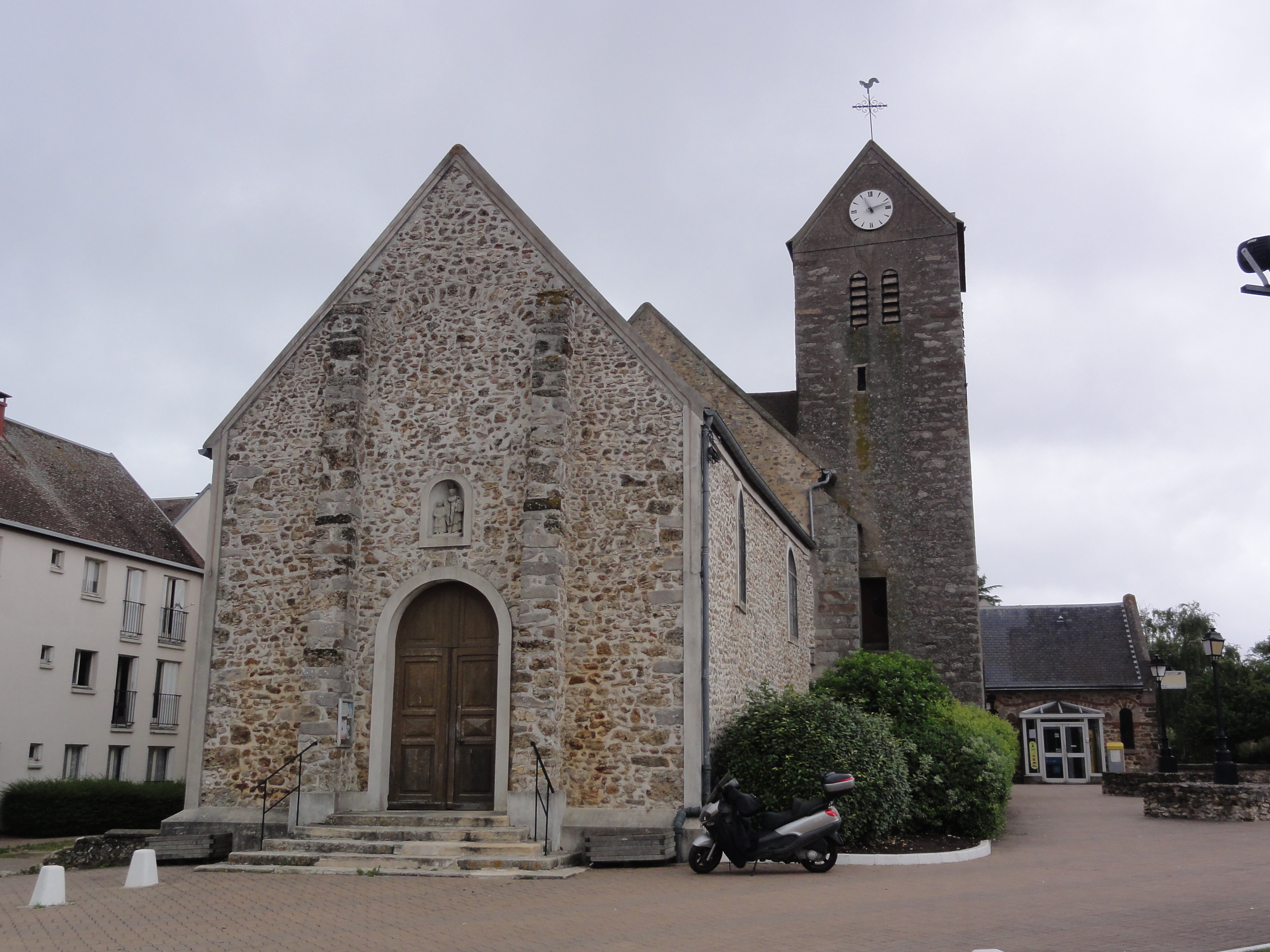 Nozay (Essonne) Église